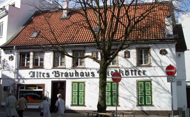 Bild aus Bochum, selbst aufgenommen, GFDL